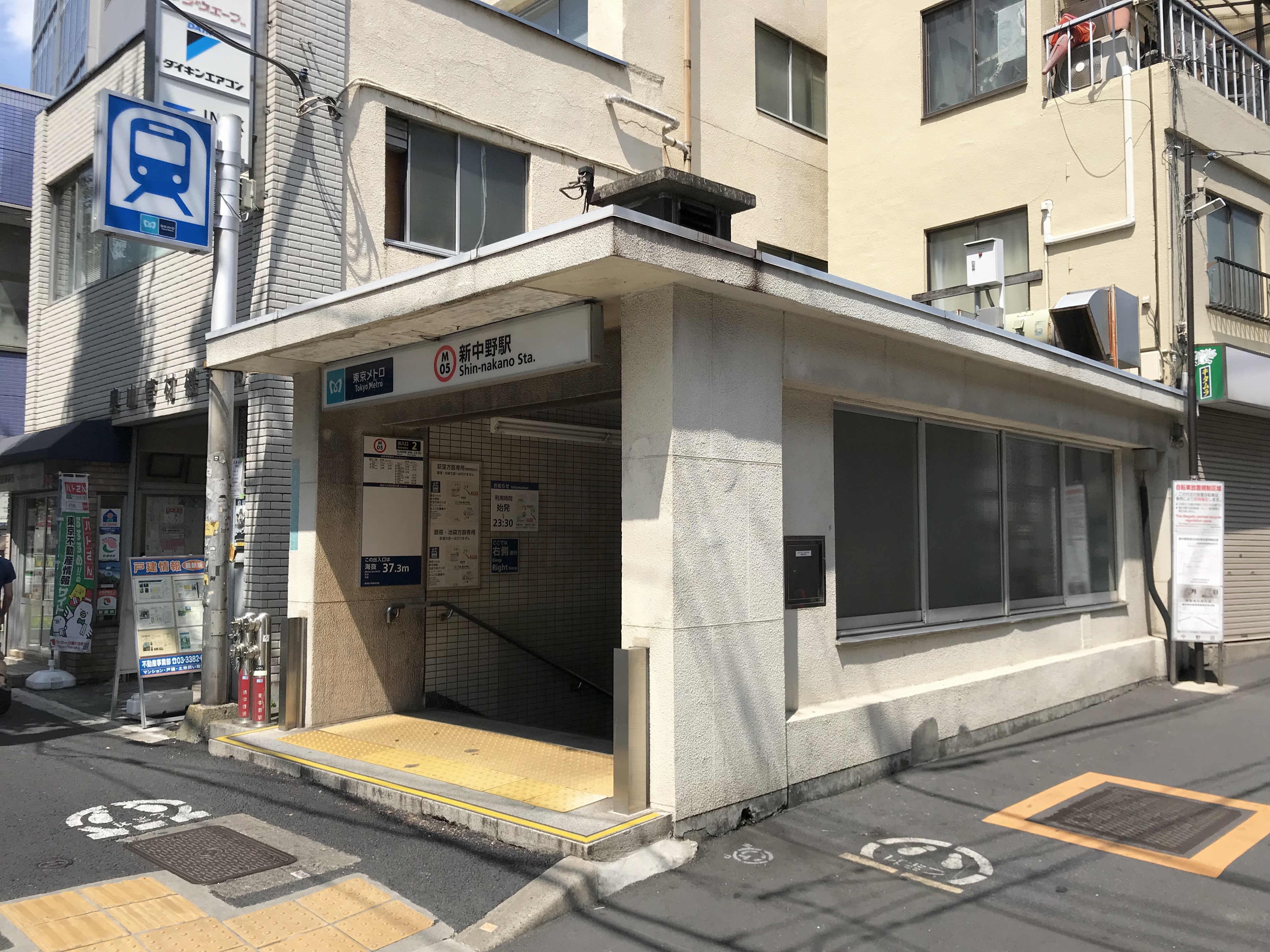 東京メトロ丸ノ内線新中野駅1番出入口